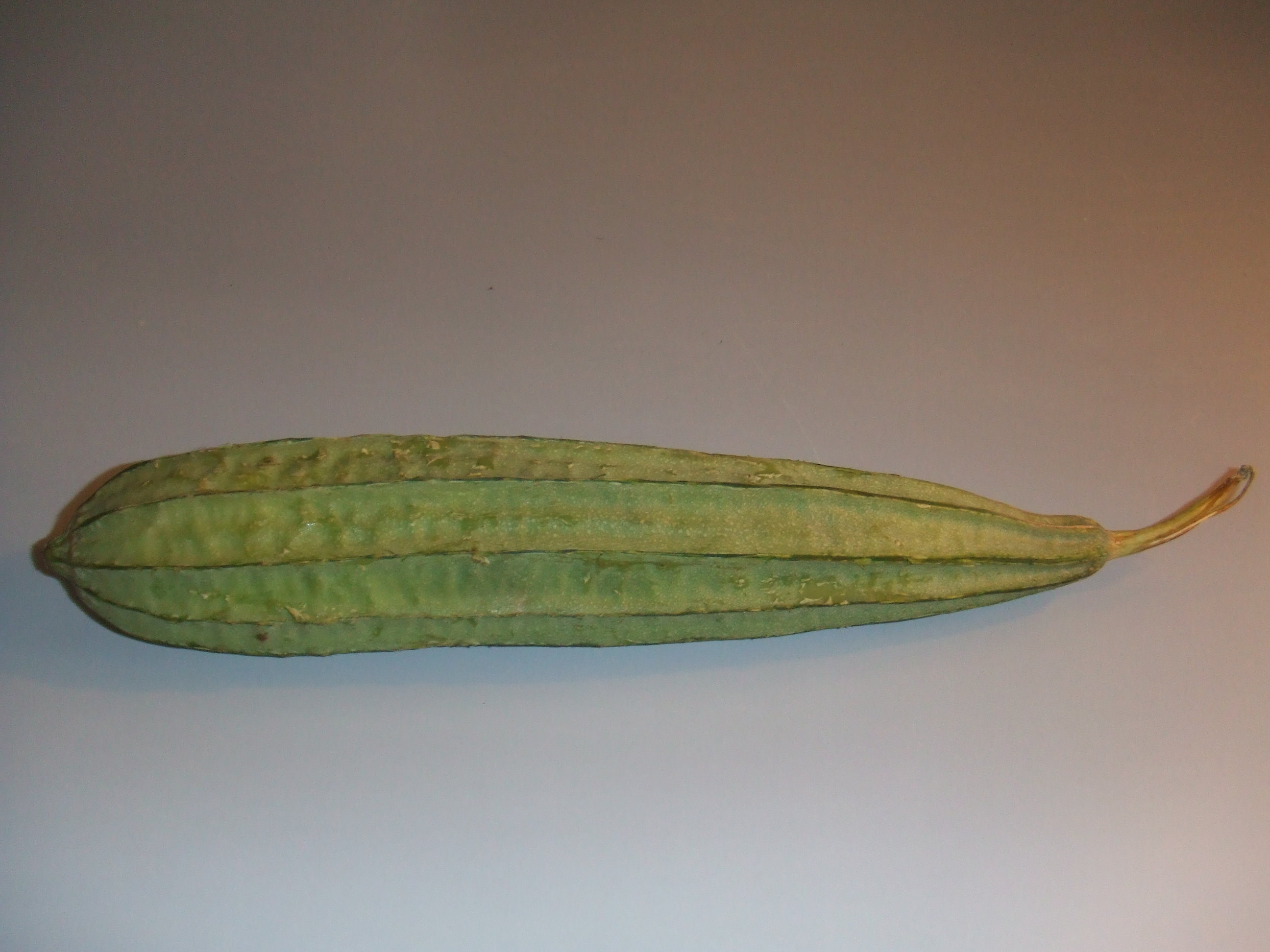 Vleugelkomkommer gekocht in Rotterdam op de Binnenrotte markt.